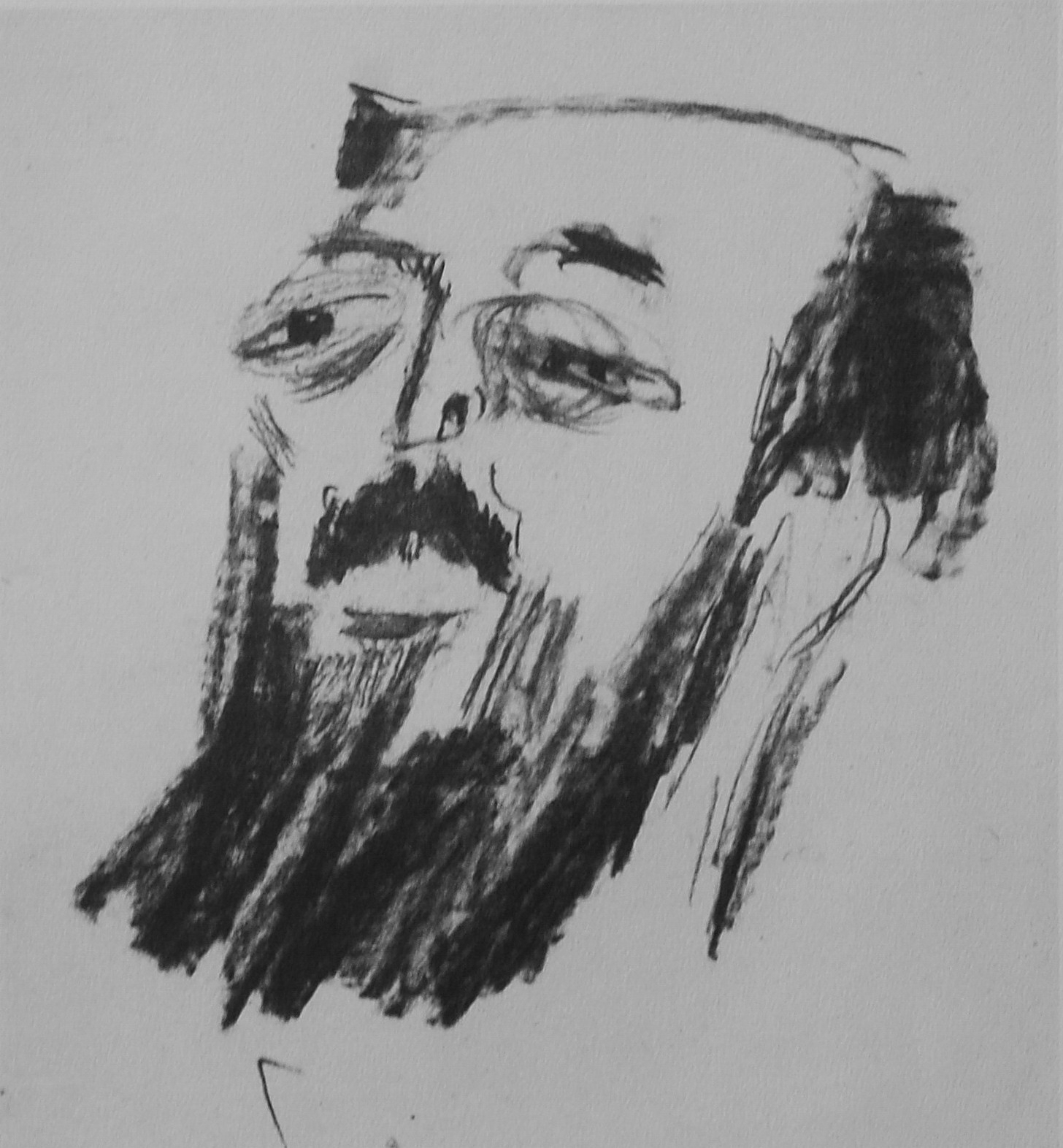 Otto Gustaf Carlsund. Karikatyrteckning av konstnärsvänner utförd av konstnären John Jon-And, utgiven postumt efter hans död 1941 i boken Konstnärer Gebers Förlag.